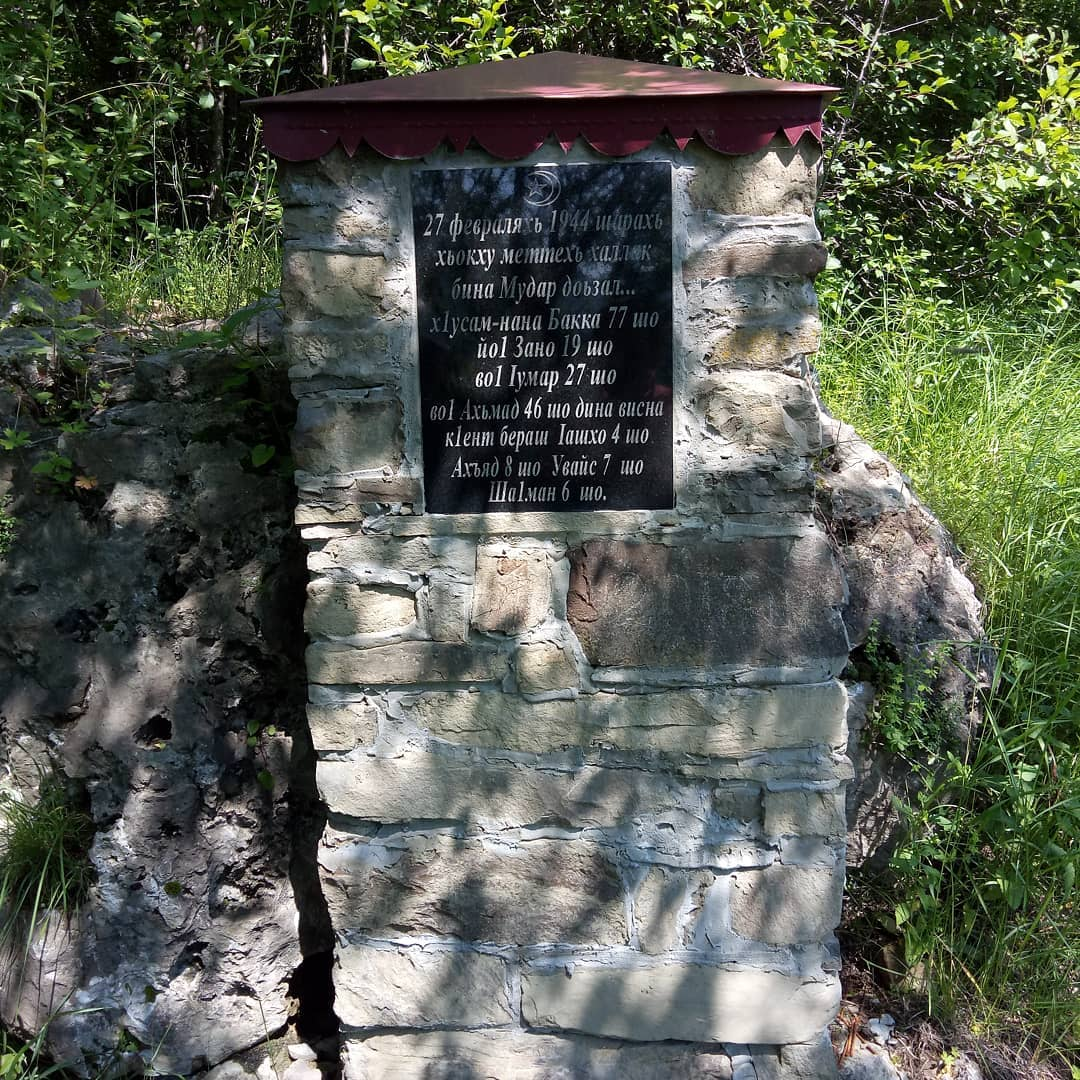 Т1ийста, Нашха. В то утро, когда сжигали людей в Хьайбахе, семью Мудара растреляли на этом месте.